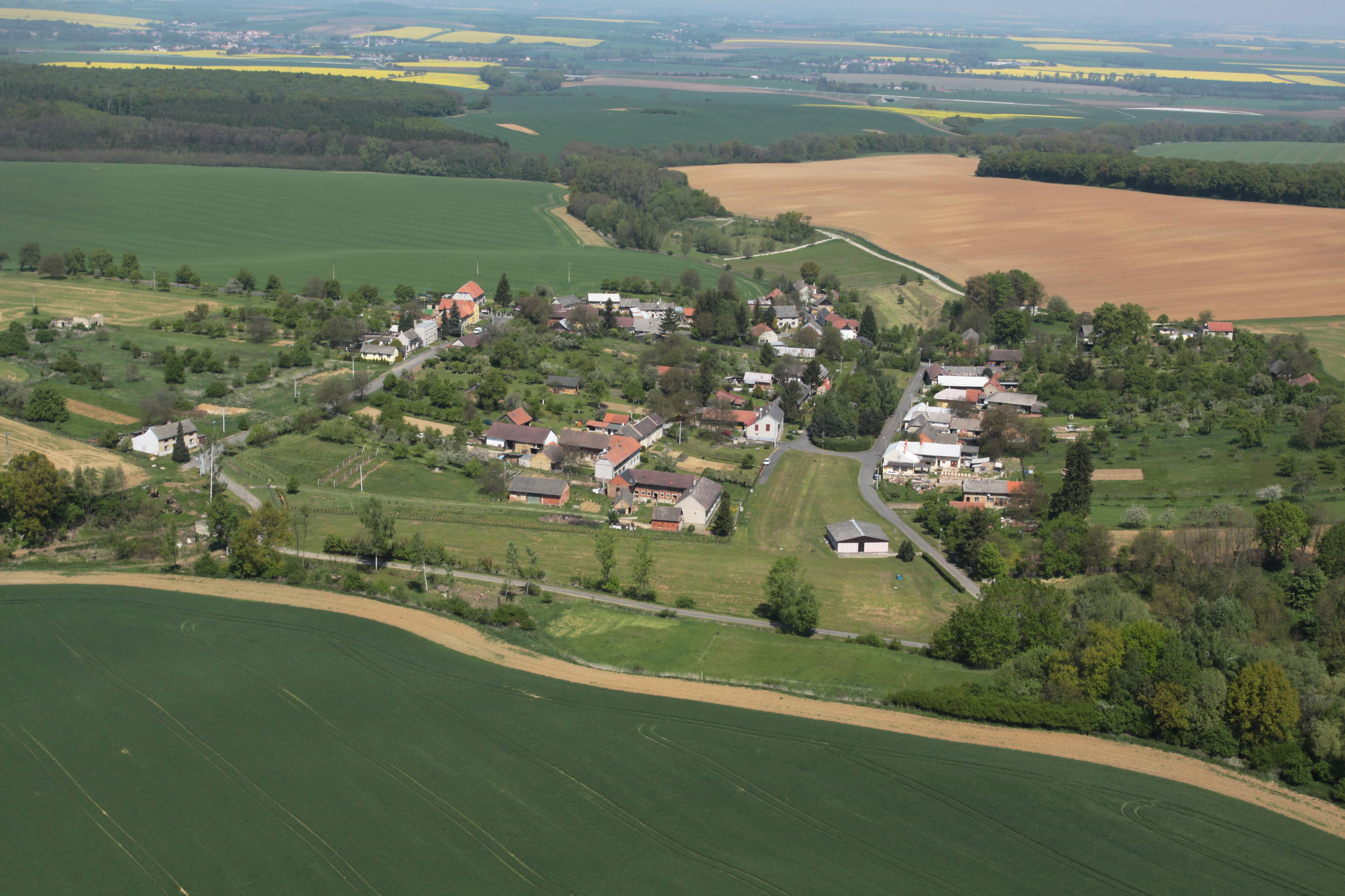 Letecká fotografie obce Vlčí Doly z jižní strany, pořízená roku 2011.